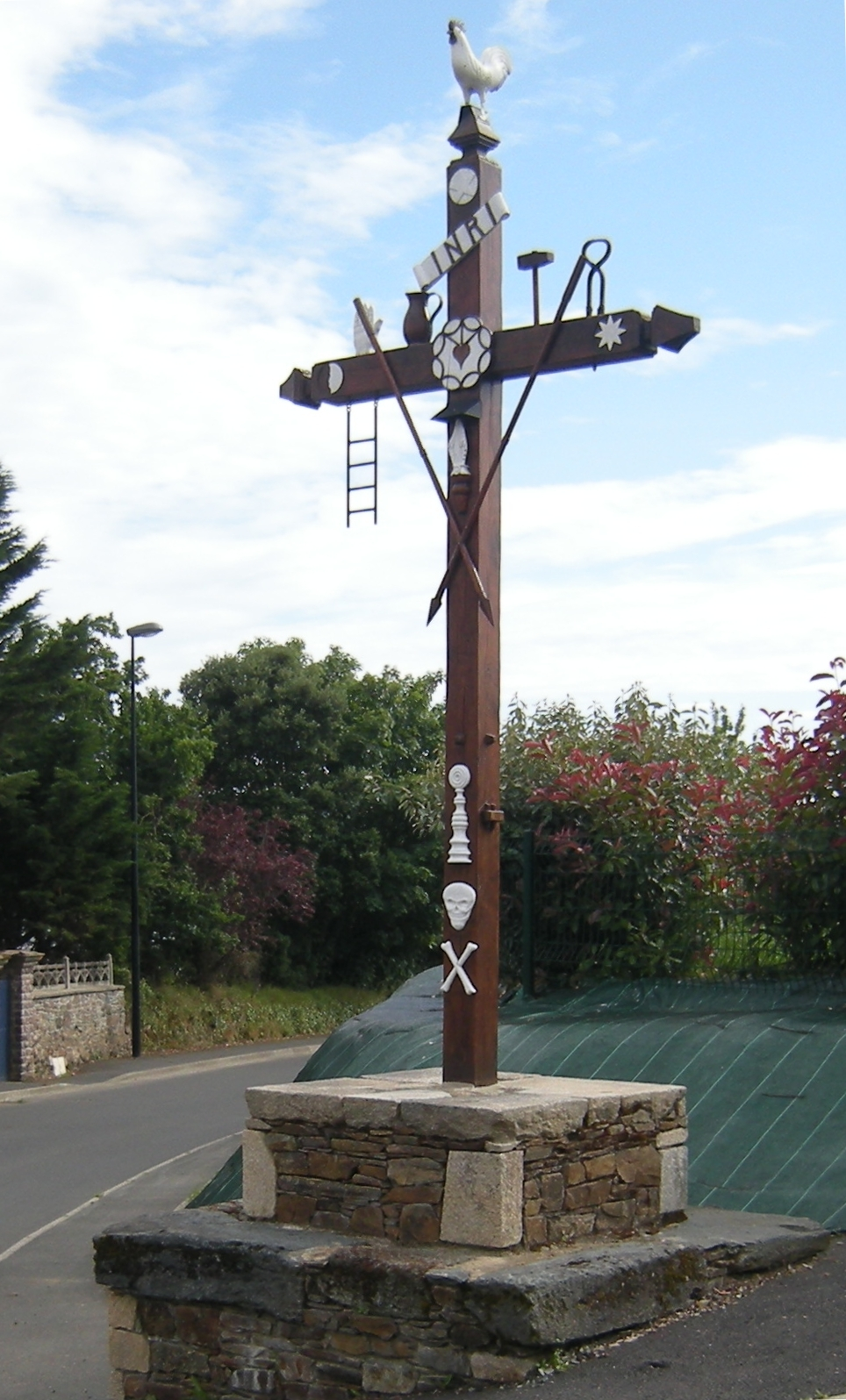 Croix présentant les outils de la passion. (Plounez, Paimpol, Côtes-d'Armor, France)